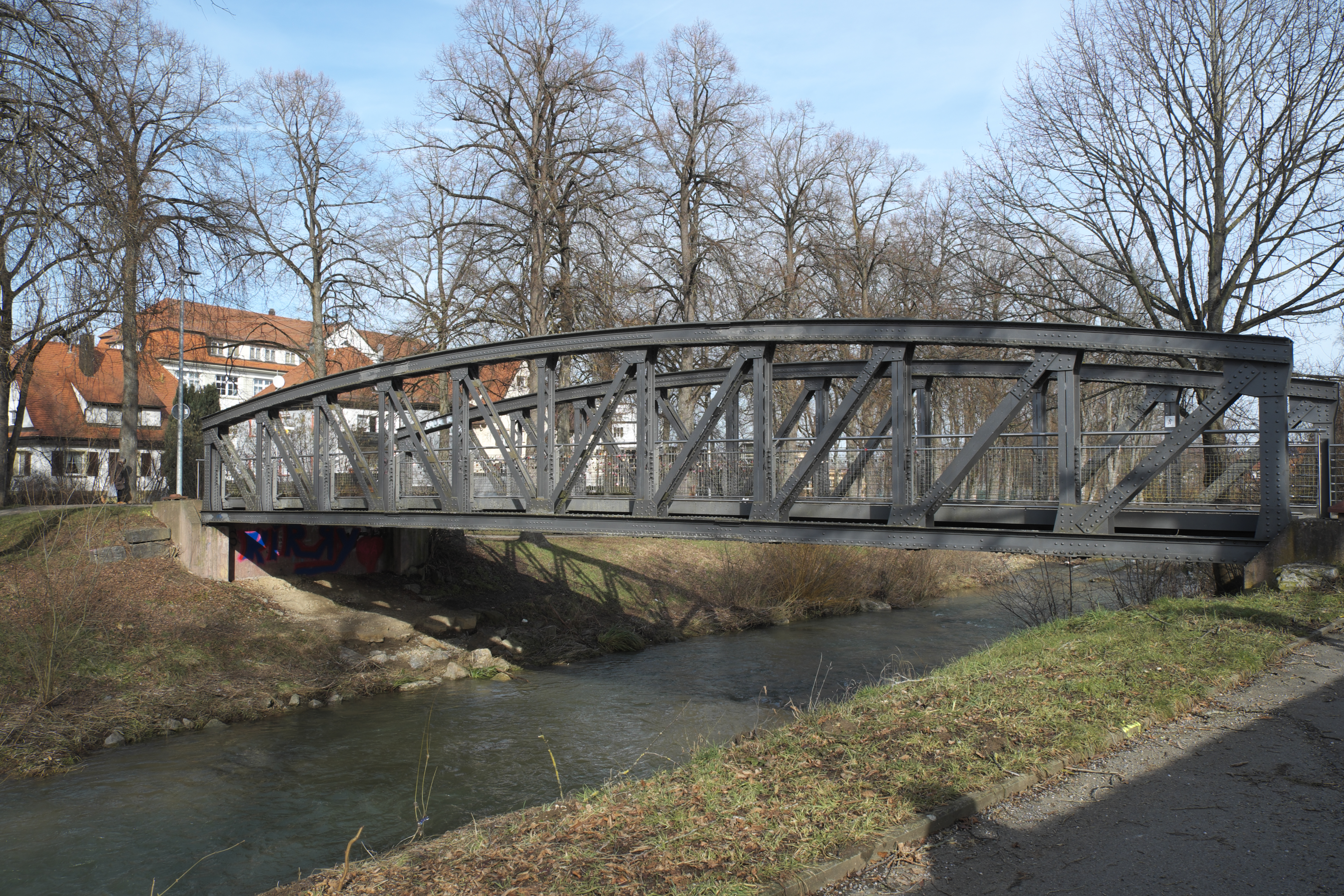 Schellenbergbrücke in Balingen im Zollernalbkreis (Baden-Württemberg/Deutschland)